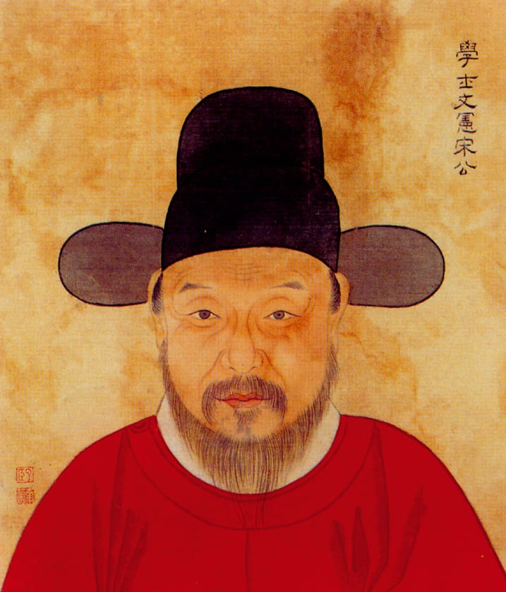 宋濂（1310年11月4日－1381年6月20日），字景濂，號潛溪，又號玄真子，諡文憲，浙江省浦江縣人。明初政治家、文學家、史學家。方孝孺之師，曾任翰林，修《元史》。後因故被明太祖謫死蜀地。